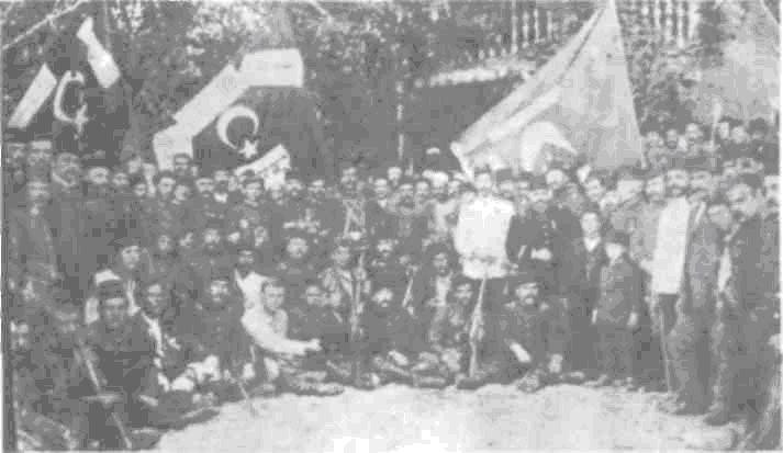 Четите на Петър Китанов и Ичко Бойчев през Хуриета.